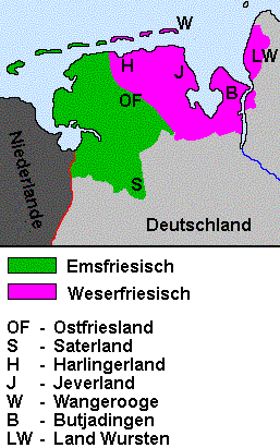 Karte der historischen Verbreitung der Dialekte der Ostfriesischen Sprache im heutigen deutschen Bundesland Niedersachsen.